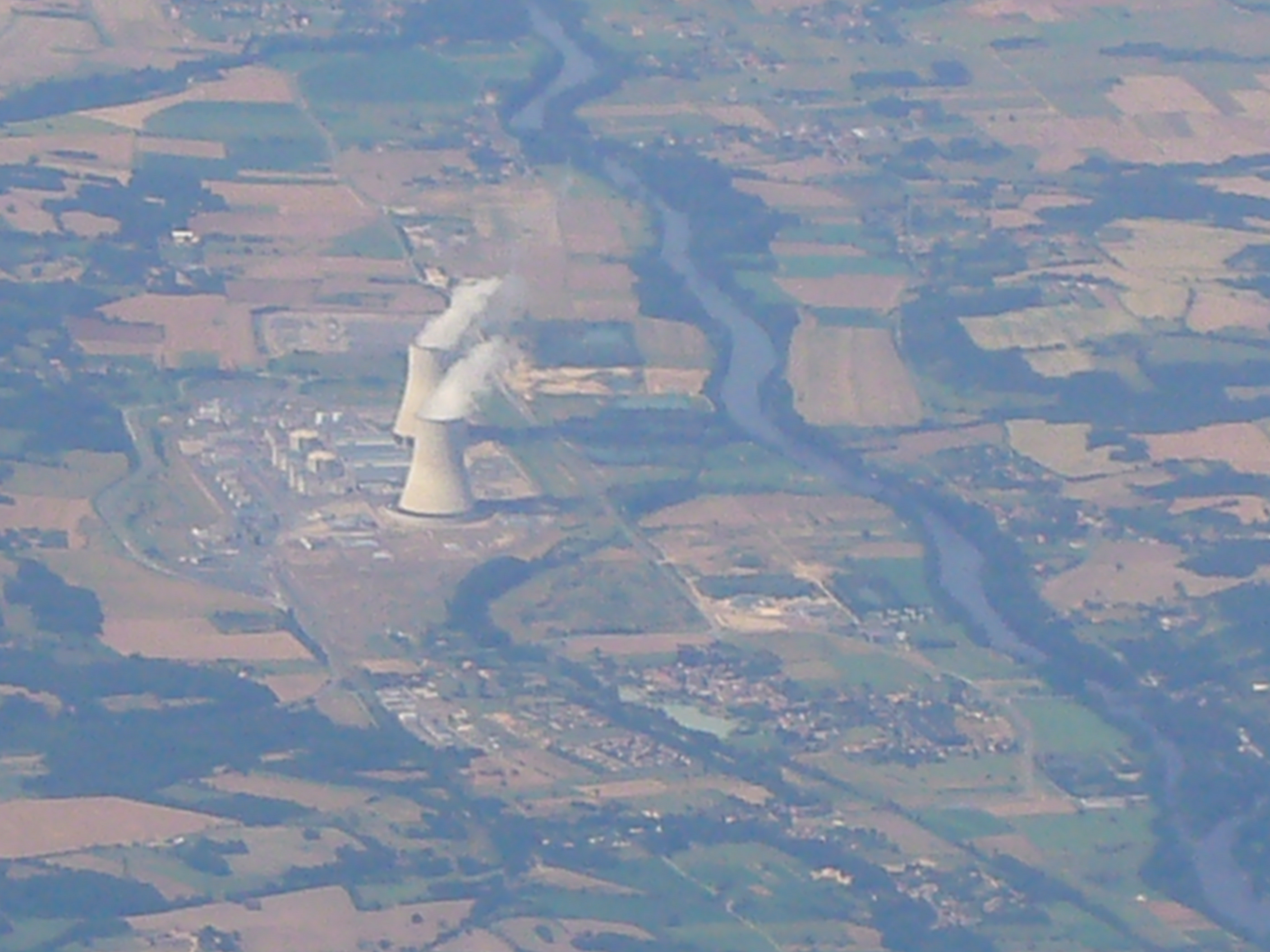 Vue aérienne de la centrale nucléaire de Civaux (Vienne, France)